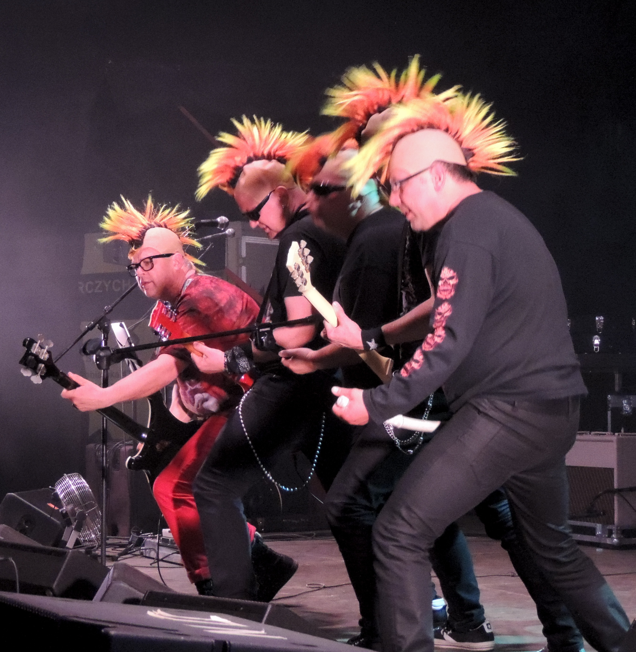 Big Cyc Juvenalia Lumumbowo Łódź 2013-05-18